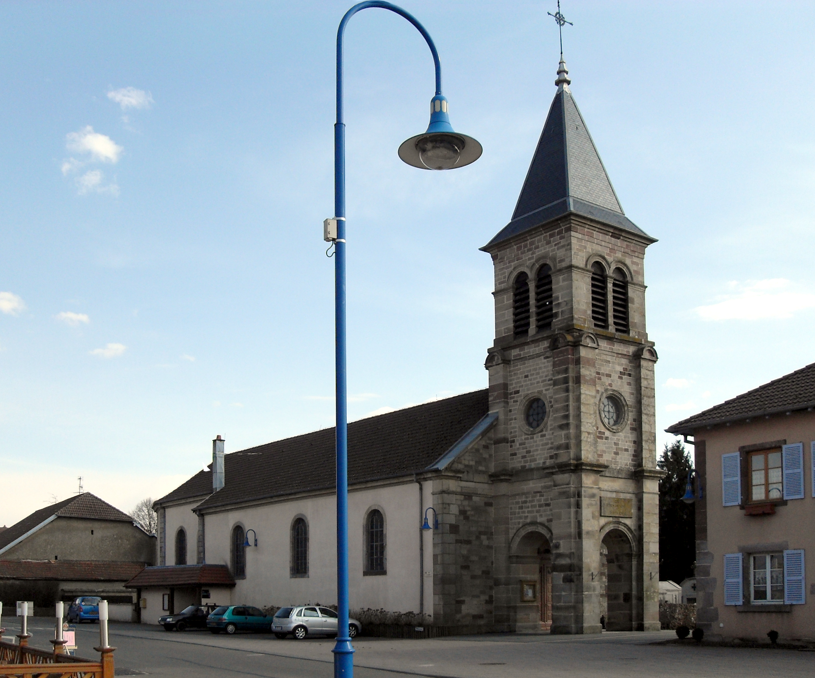 L'église Saint-Claude d'Évette-Salbert